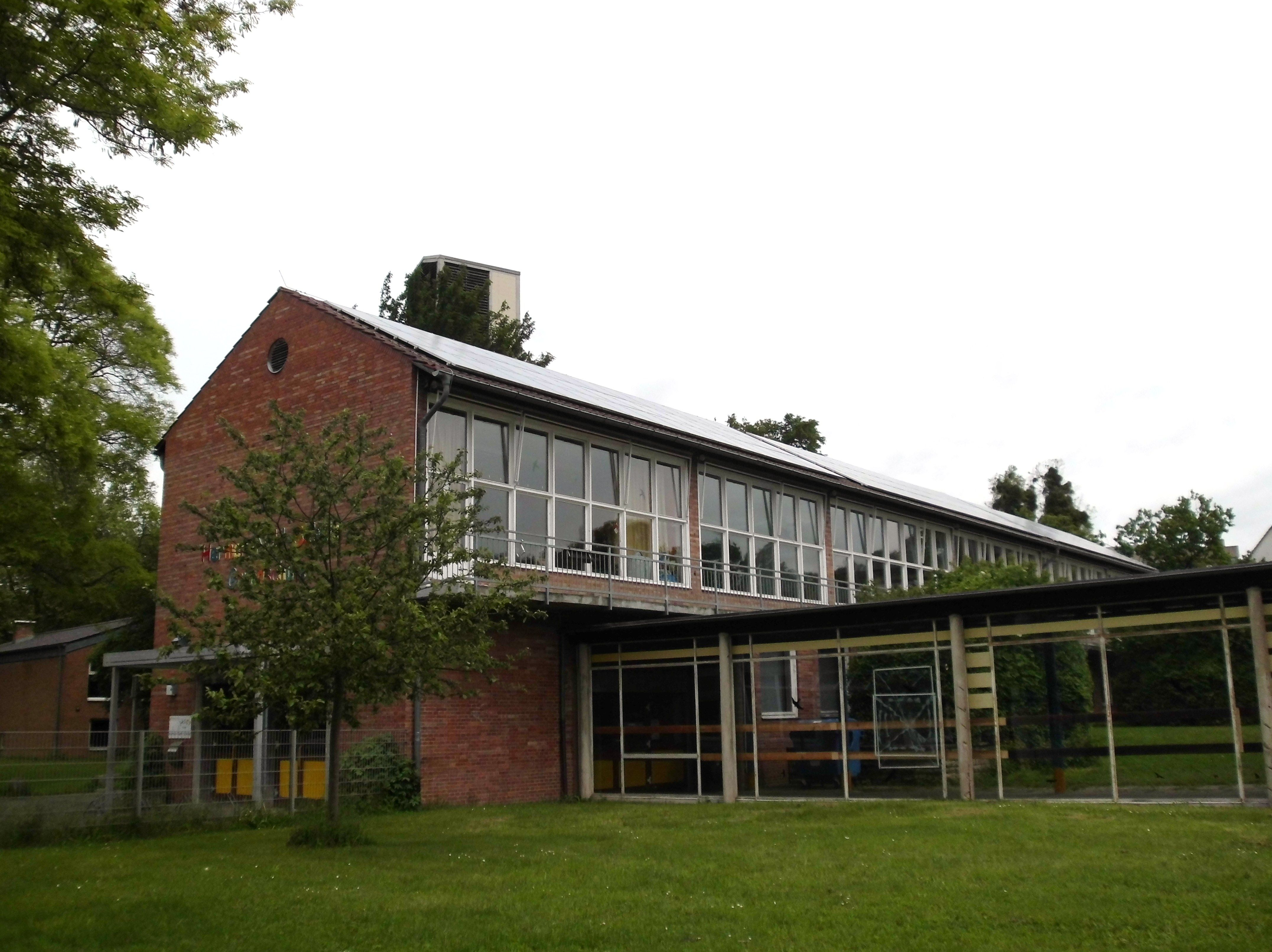 Haupteingang der Herman-Nohl-Schule, Grundschule in der Immanuel-Kant-Straße in der Südstadt von Göttingen. Erbaut 1955-1957 von dem Göttinger Architekten Diez Brandi zusammen mit der daneben liegenden Schule (heute HG Junior, Unterstufengebäude ds Heinberg-Gymnasiums) und der Kreuzkirche.